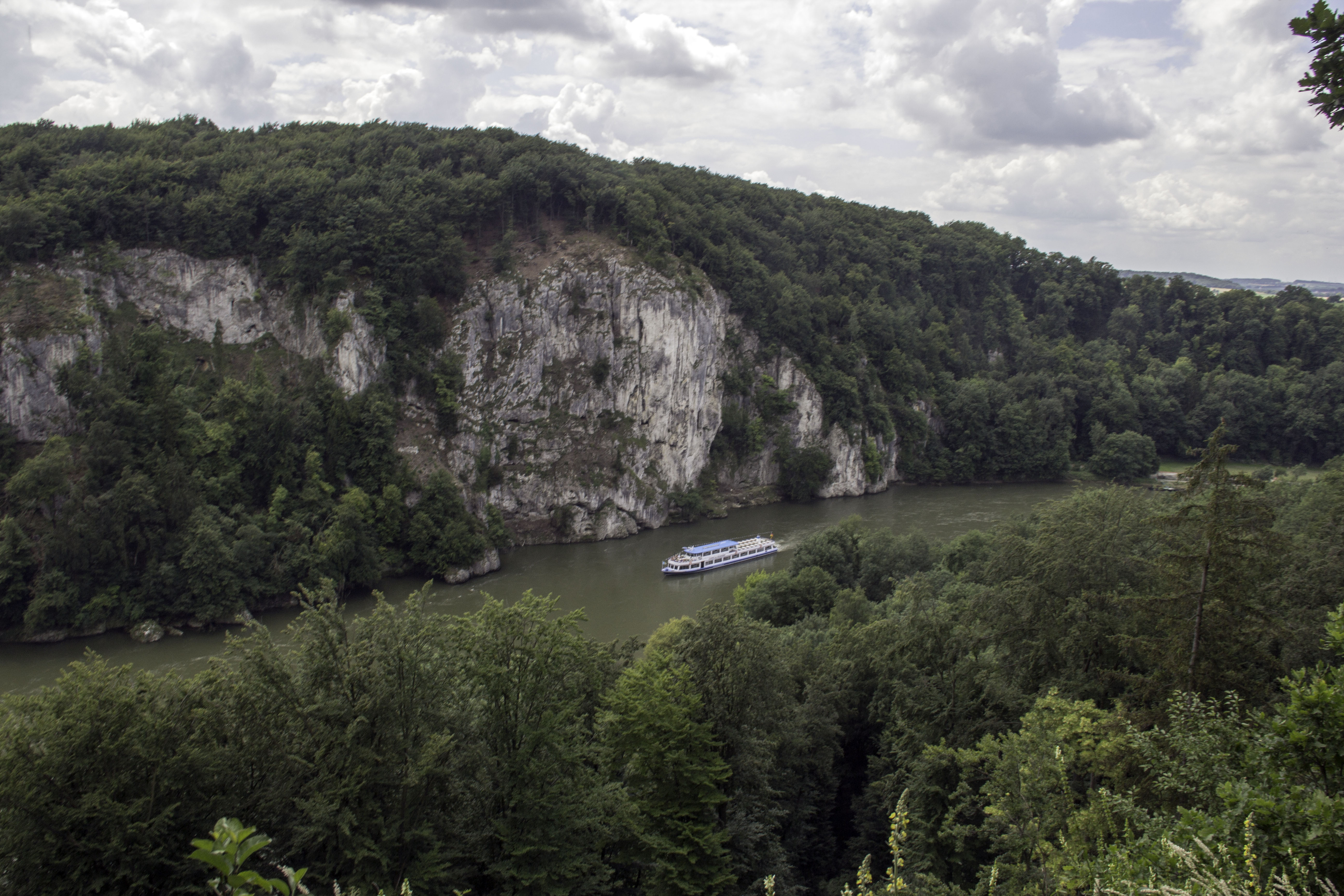 Weltenburger Enge, Donau, Schiff